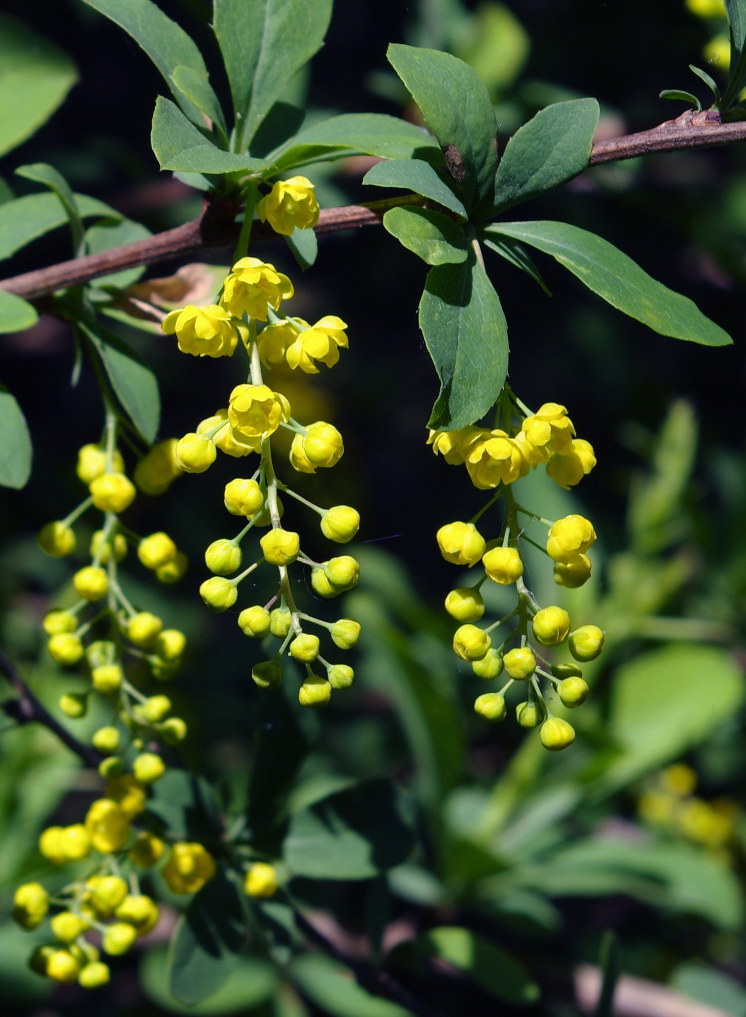 Berberis chinensis Poir.